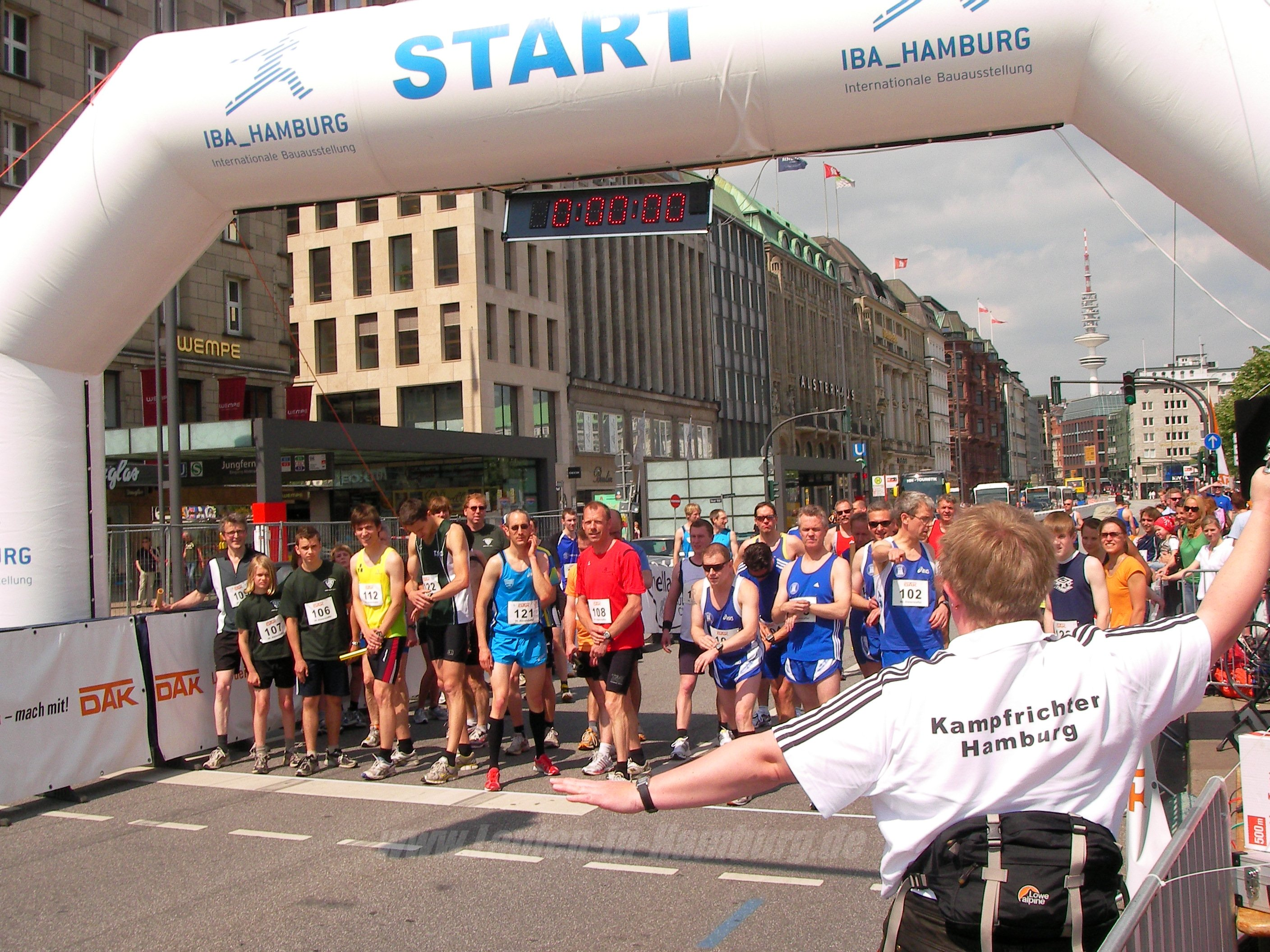 Startschuss zur 96. Alsterstaffel Hamburg, 25. Mai 2009, Teamstaffel Wertung (3x1792m)